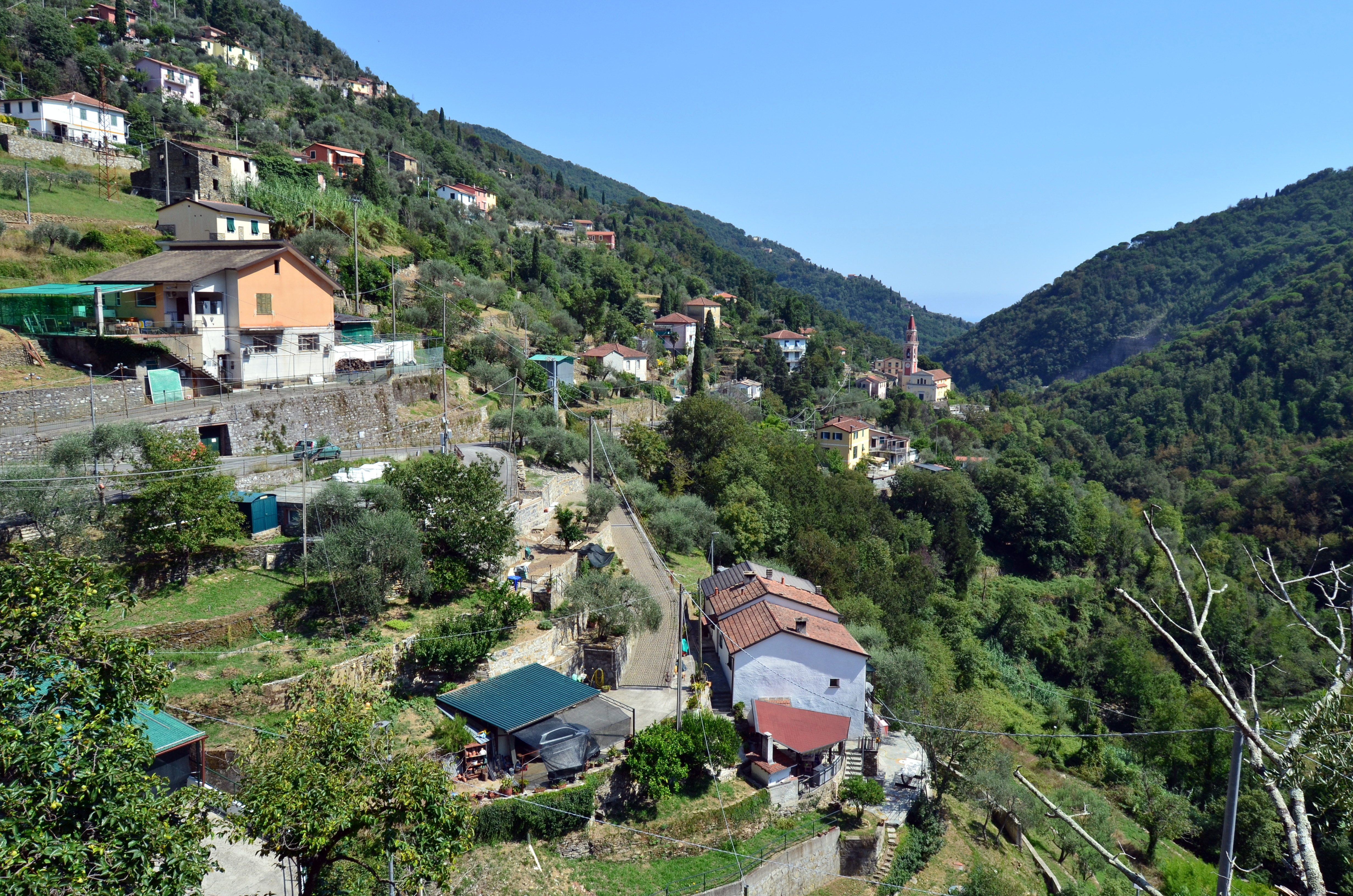 Panorama di Sant'Andrea di Foggia, Rapallo, Liguria, Italia